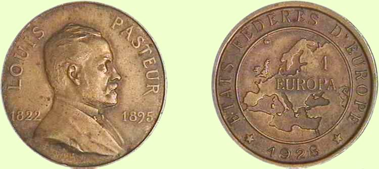 Monnaie européenne de 1928